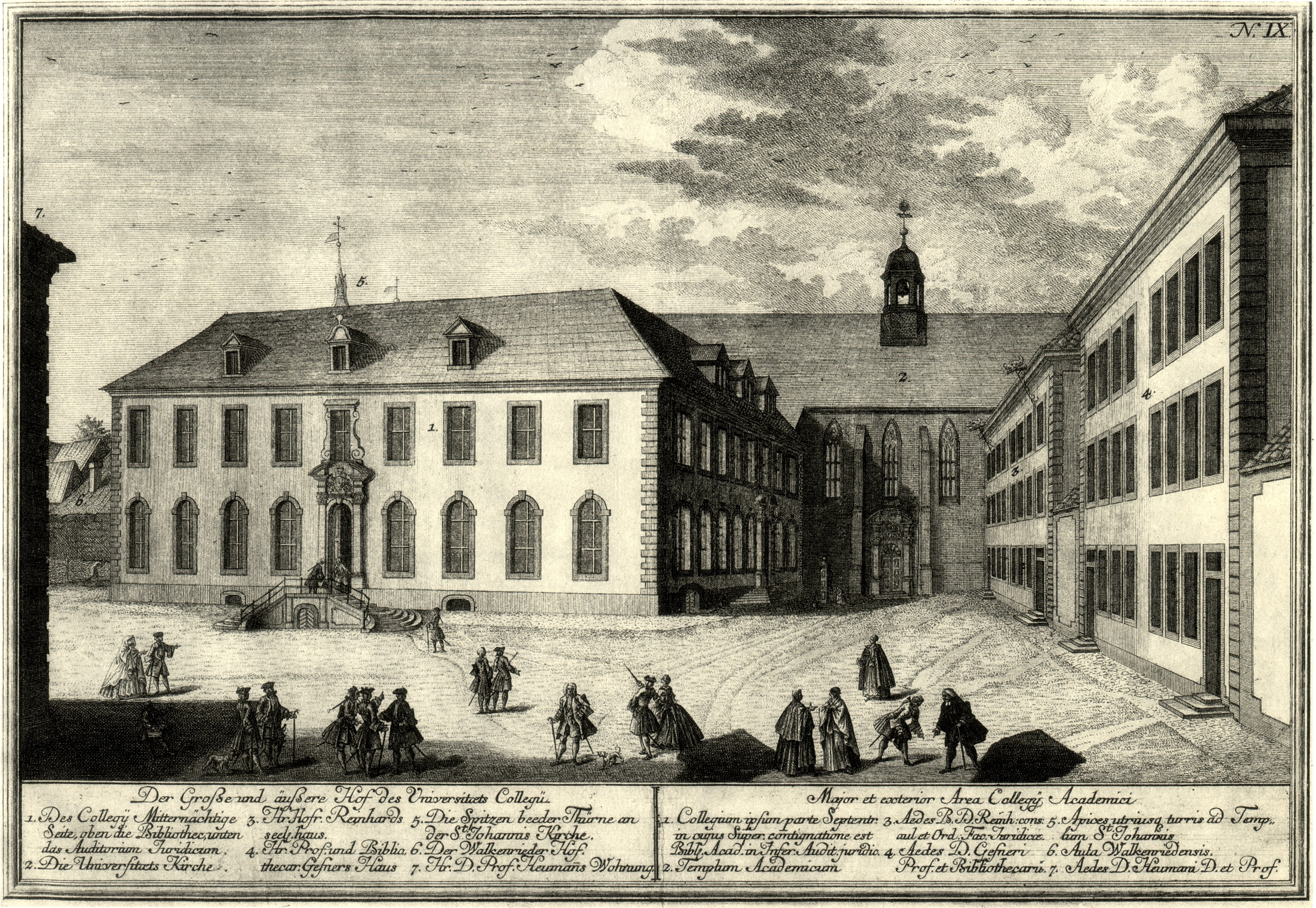 Der Große und äußere Hof des Universitaets Collegii. Kollegiengebäude der Georg-August-Universität Göttingen, hinten die ehemalige Paulinerkirche,rechts Professorenhäuser. Kupferstich des Universitätskupferstechers Georg Daniel Heumann, Tafel IX aus Wahre Abbildung, Der Königl. GroßBritan. und Churfürstl. Braunschw. Lüneb. Stadt, Göttingen. Ihrer Grund-Lage, Aüserl. und Innerliche Prospecte und der Zum Georg Augustus Universitaet gehörigen gebäude Gezeichnet, und in Kupffer herauß gegeben, durch Georg Daniel Heumann Königl. Groß-Brit. Hoff und Universitaets Kupfferstecher in Goettingen